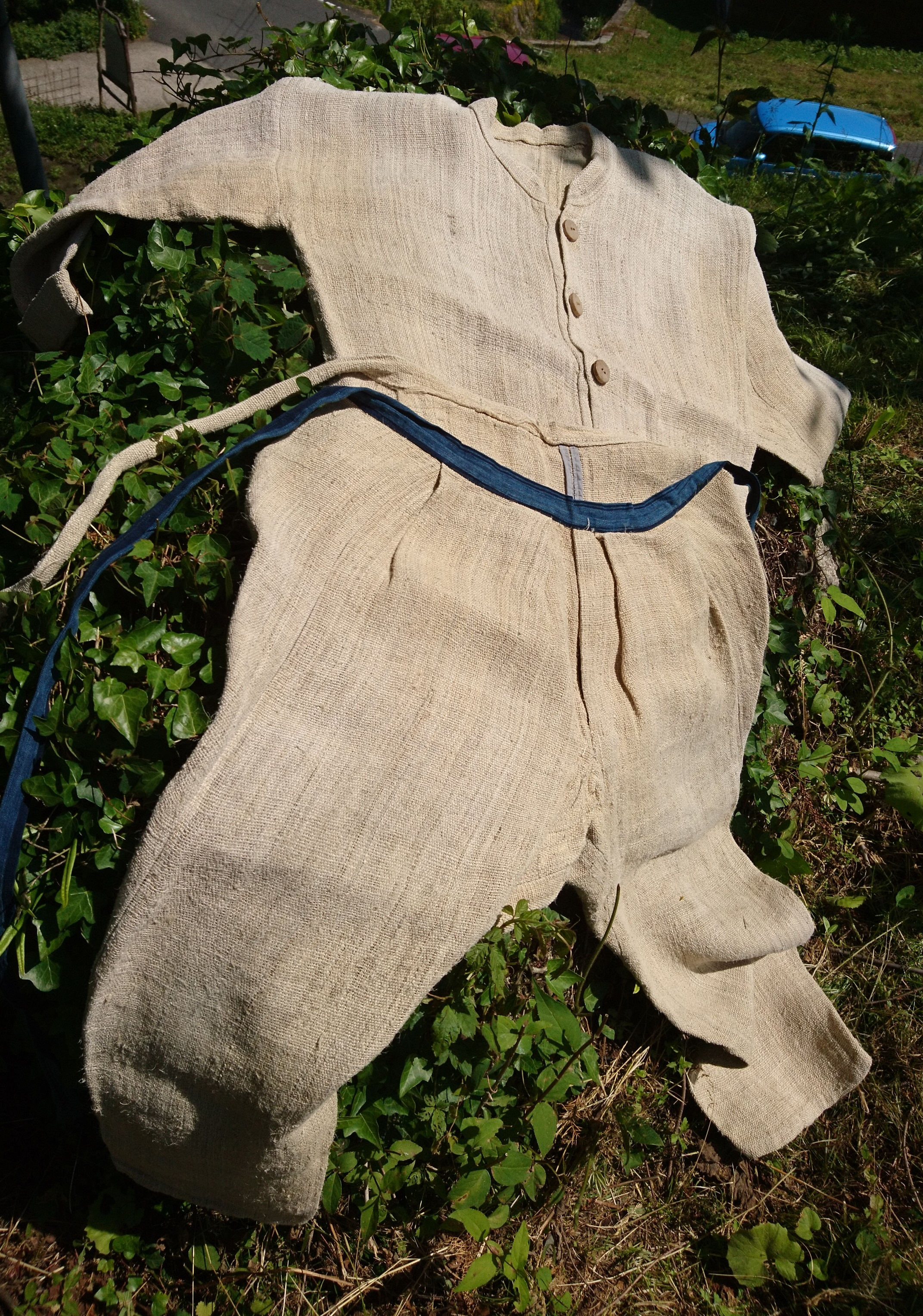 藤織りの仕事着（10年以上使用済みのもの）